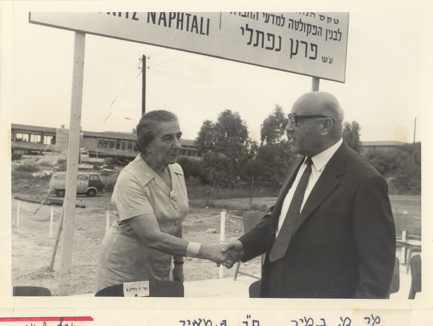 גולדה מאיר ומרדכי נמיר בהנחת אבן הפינה לבניין נפתלי 29 אוקטובר 1967